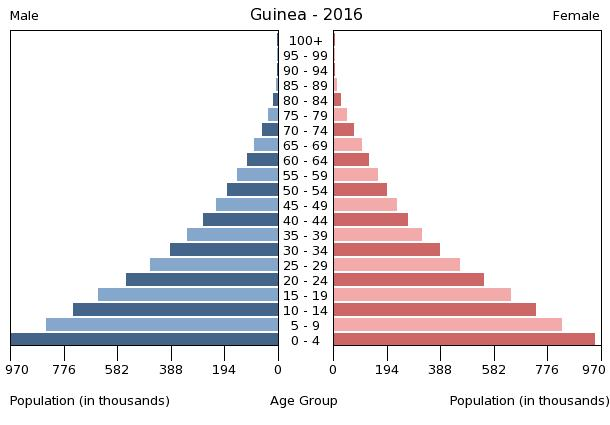 A population pyramid illustrates the age and sex structure of a country's population and may provide insights about political and social stability, as well as economic development. The population is distributed along the horizontal axis, with males shown on the left and females on the right. The male and female populations are broken down into 5-year age groups represented as horizontal bars along the vertical axis, with the youngest age groups at the bottom and the oldest at the top. The shape of the population pyramid gradually evolves over time based on fertility, mortality, and international migration trends.